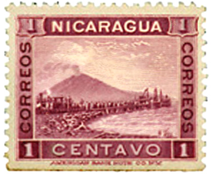 Momotombo volcano 1900 Edition Stamp.